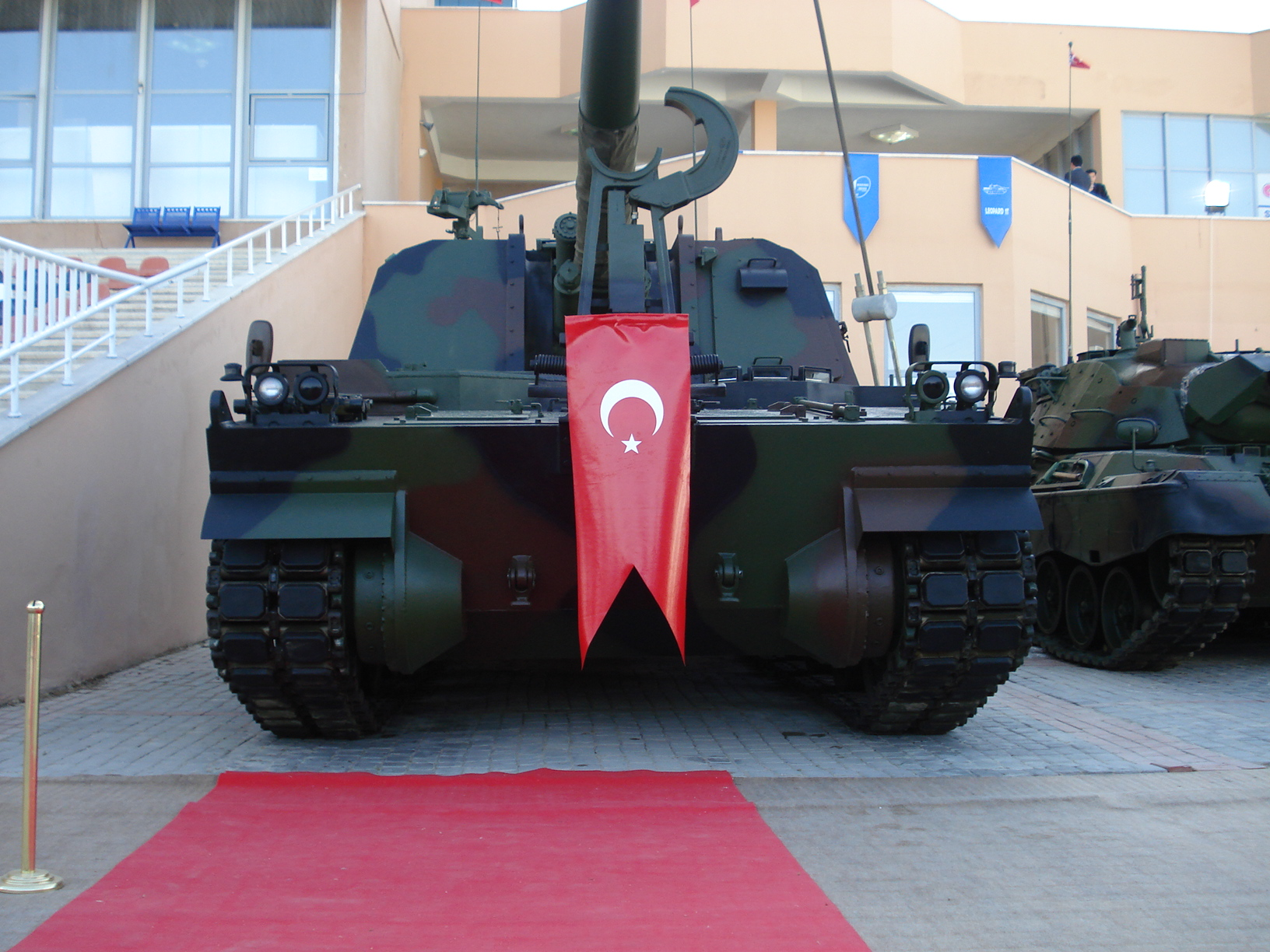 IDEF '07 Savunma Fuarı'nda çekildi.Fırtına Obüs.23 Mayıs 2007